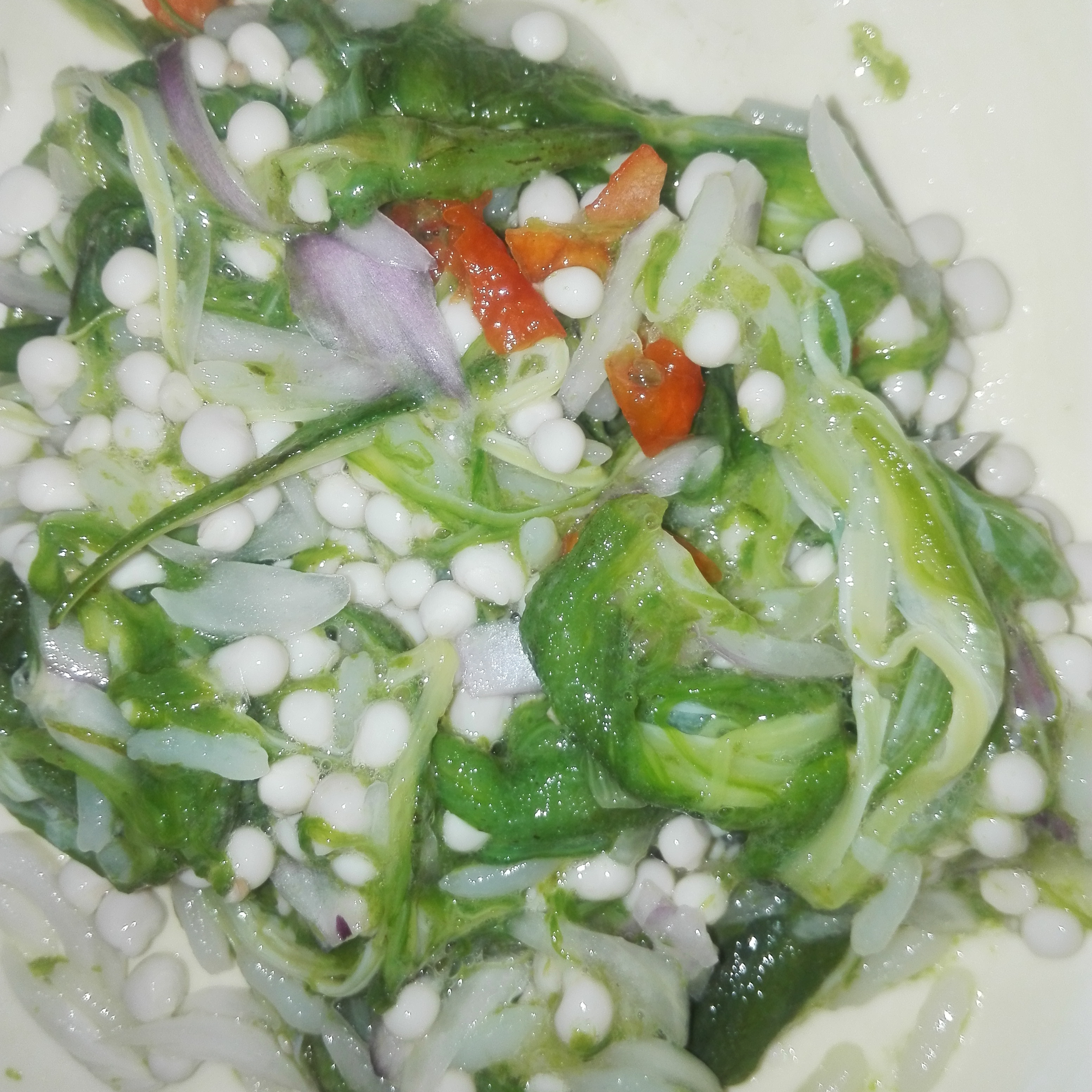 ladies finger bharta